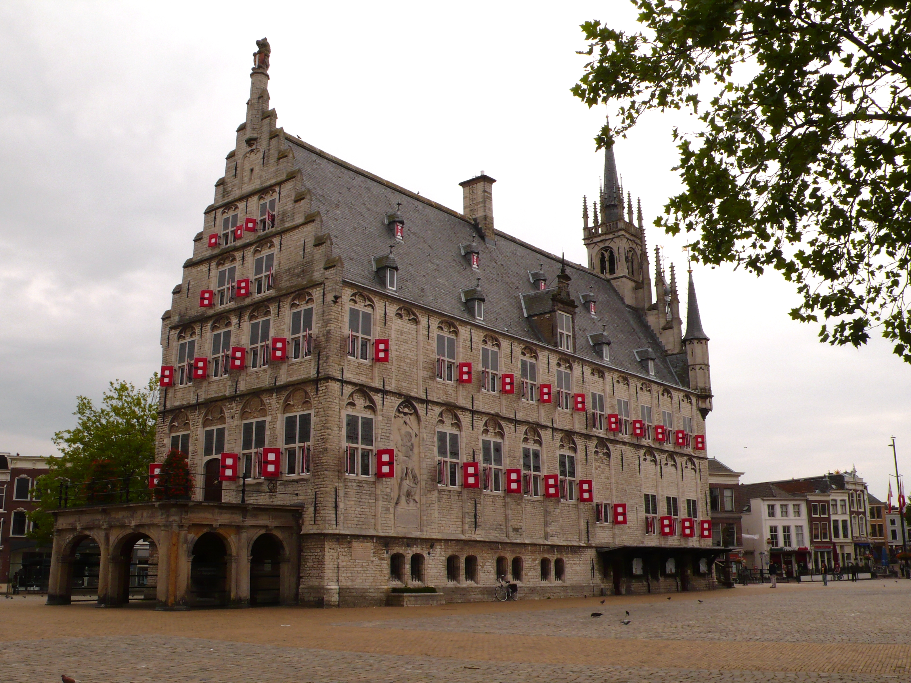 Gouda, Niederlande; Stadhuis